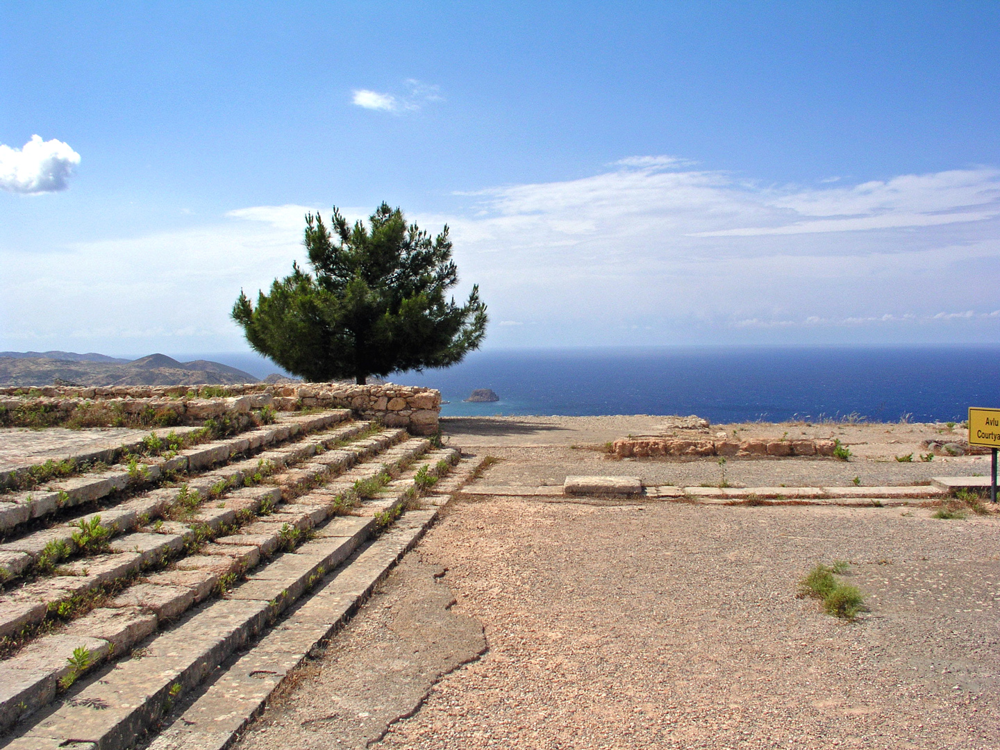 Den stora trappan i Vounipalatset